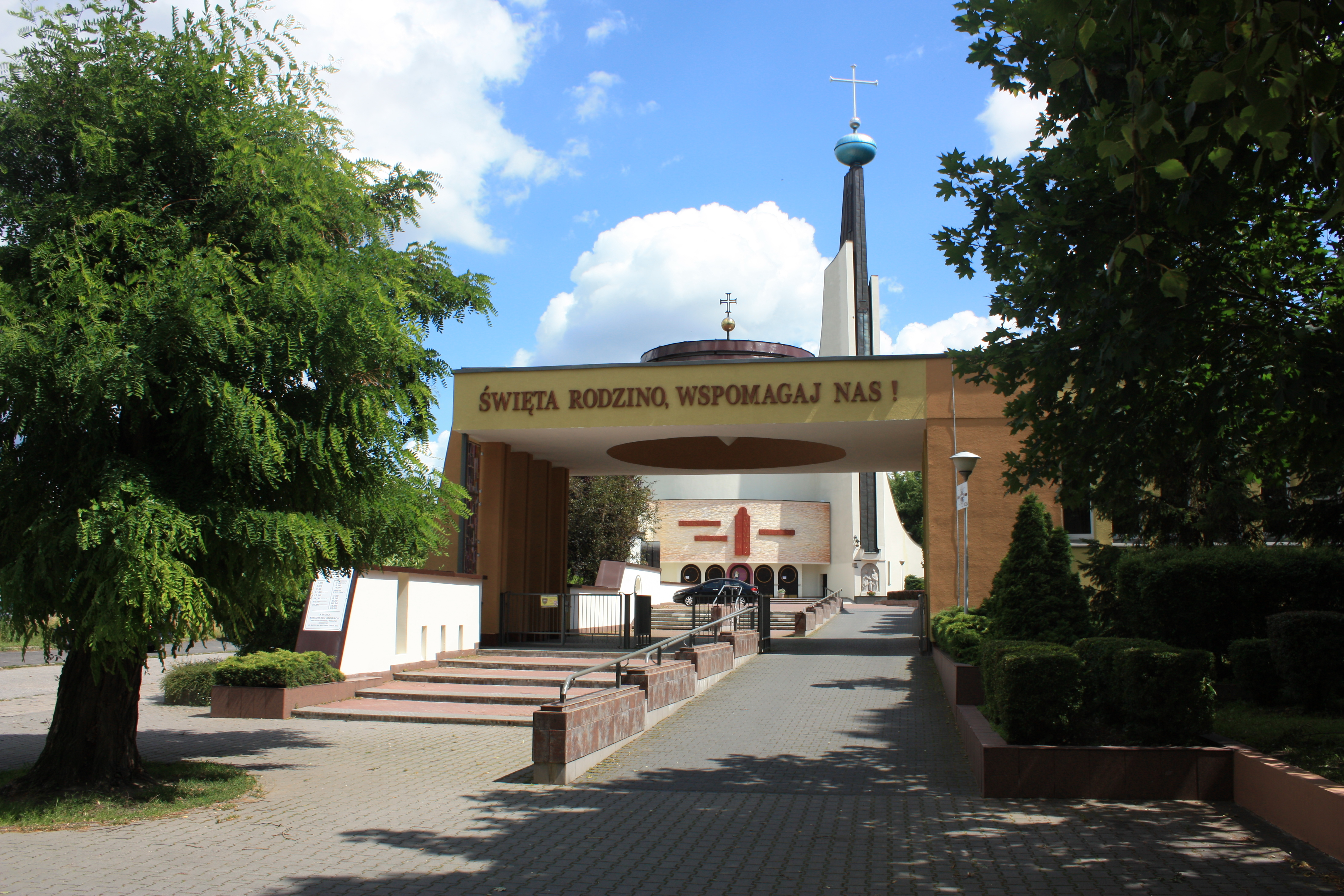 Brama kościoła Świętej Rodziny w Poznaniu.